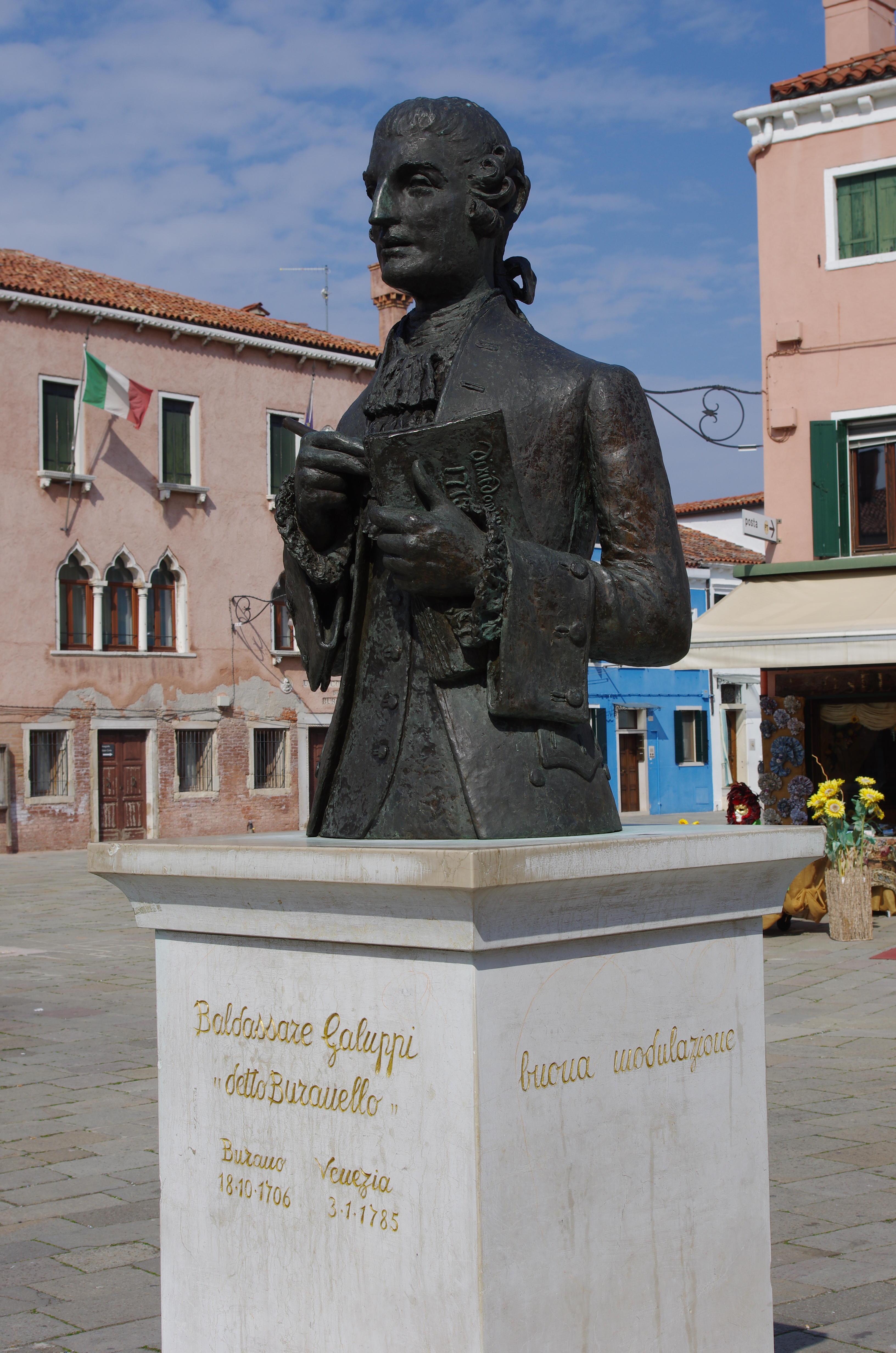 Burano in Venedig. Das Denkmal für Baldassare Galuppi in der Nähe des Museums.